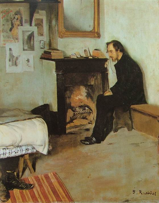 Erik Satie Logis (6 rue Cortot 6, "cabinet")label QS:Len,"Erik Satie Logis (6 rue Cortot 6, "cabinet")"label QS:Lru,"картина Сантьяго Русиноля "Жилище Эрика Сати" (его комната или "шкаф" на рю Корто)"